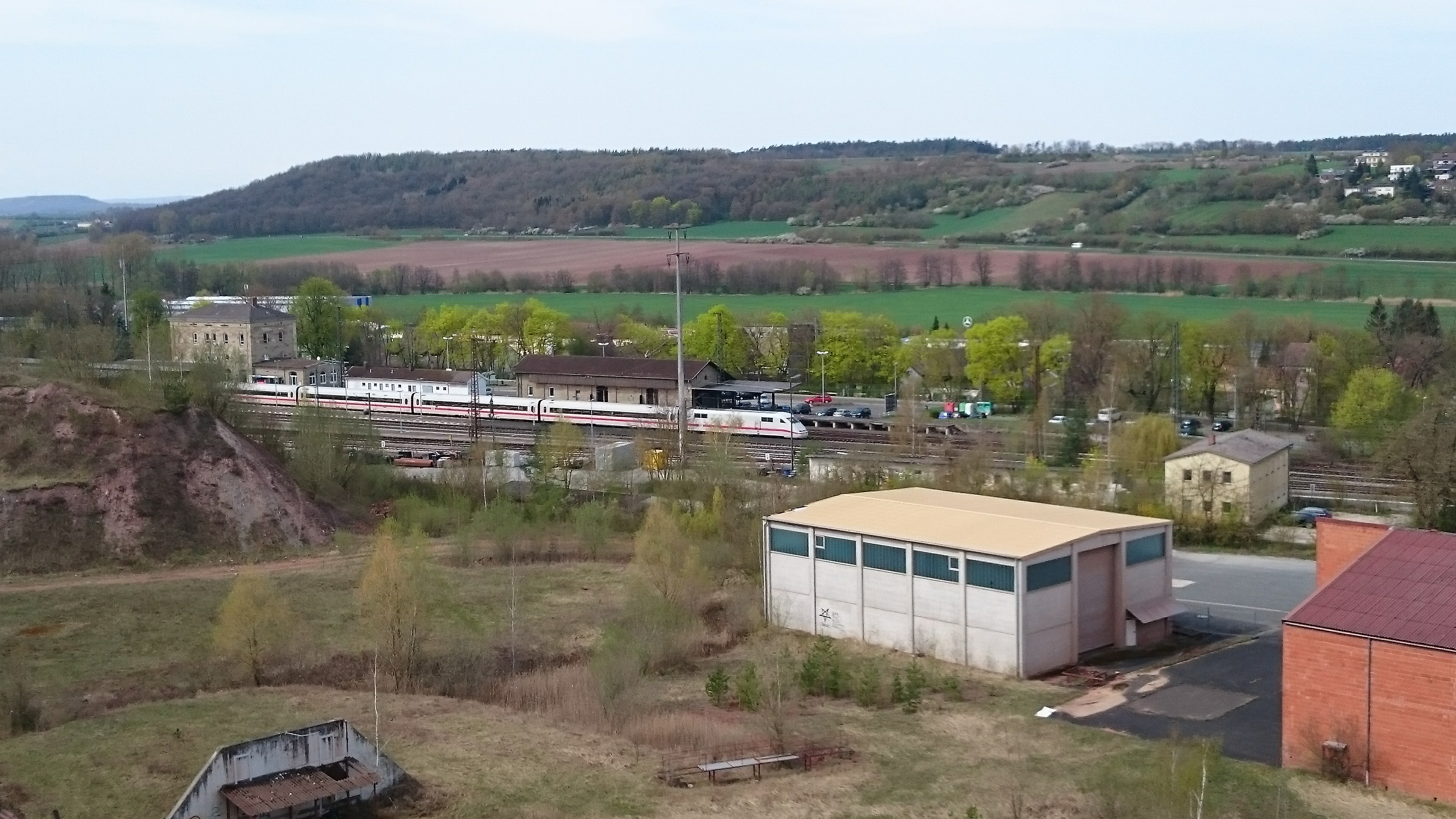 Neustadt (Aisch) Bf Vogelperspektive